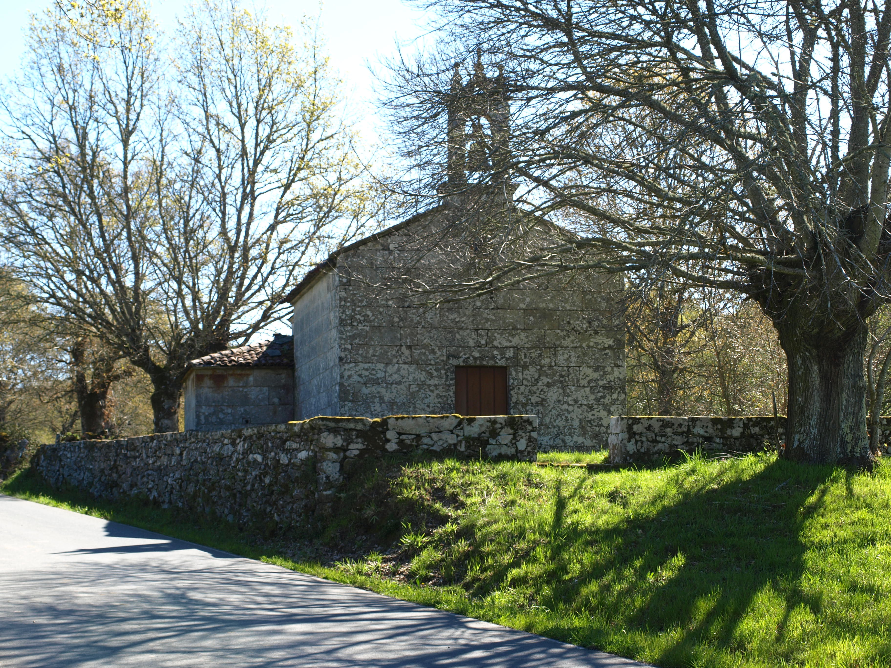 Igrexa parroquial de Lavandelo (Monterroso)